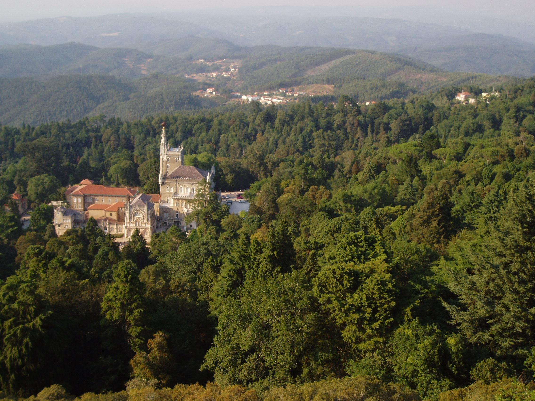 La sierra de Buçaco (Portugal) con el Hotel Palacio Buçaco.